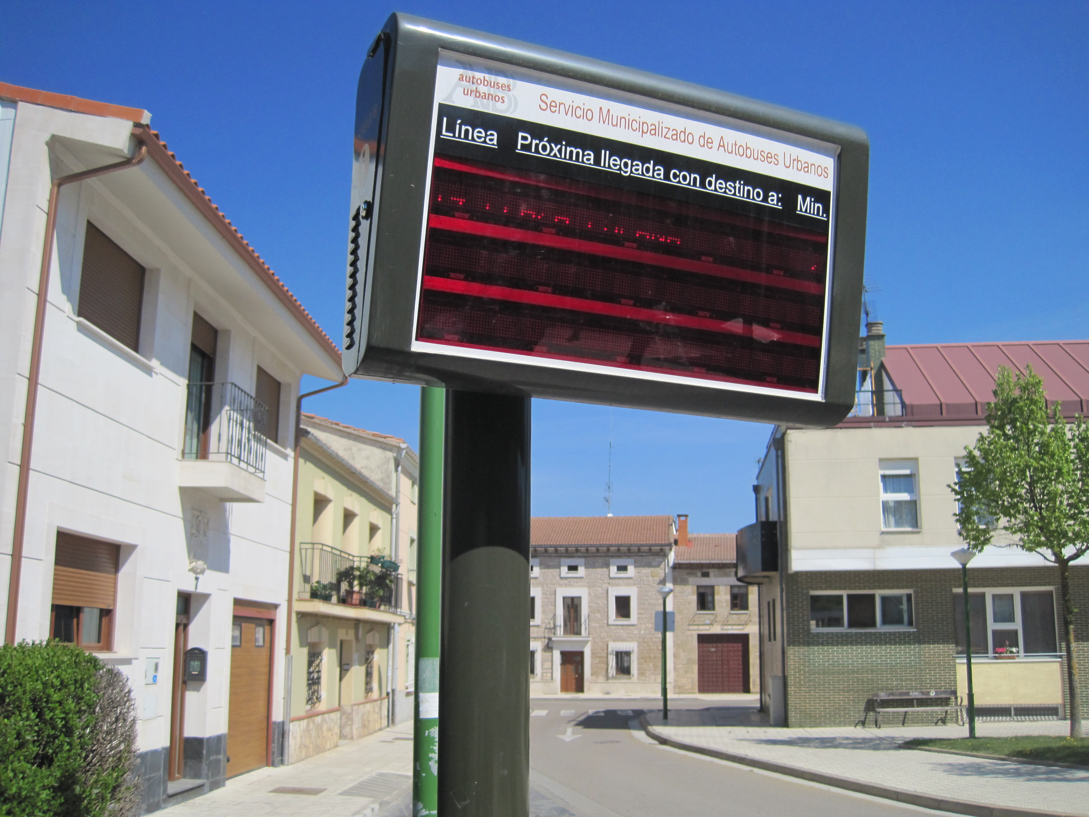 Letrero electrónico de la línea 14 del servicio de autobuses urbanos de Burgos, situado en la plaza mayor de Villatoro.